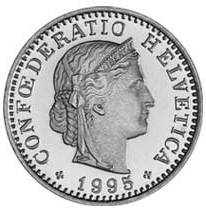 0.20 CHF 1995 / Zwanzigrappen